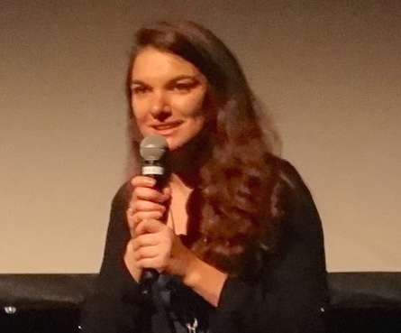 Laura Drompt pendant « La Grande Soirée : Samedi 17 novembre 2018 : Le Courrier fête ses 150 ans ! ». Salle communale de Plainpalais, rue de Carouge, Genève. Lors de la présentation du film de Dieter Fahrer "Le Quatrième pouvoir" (Die Vierte Gewalt).